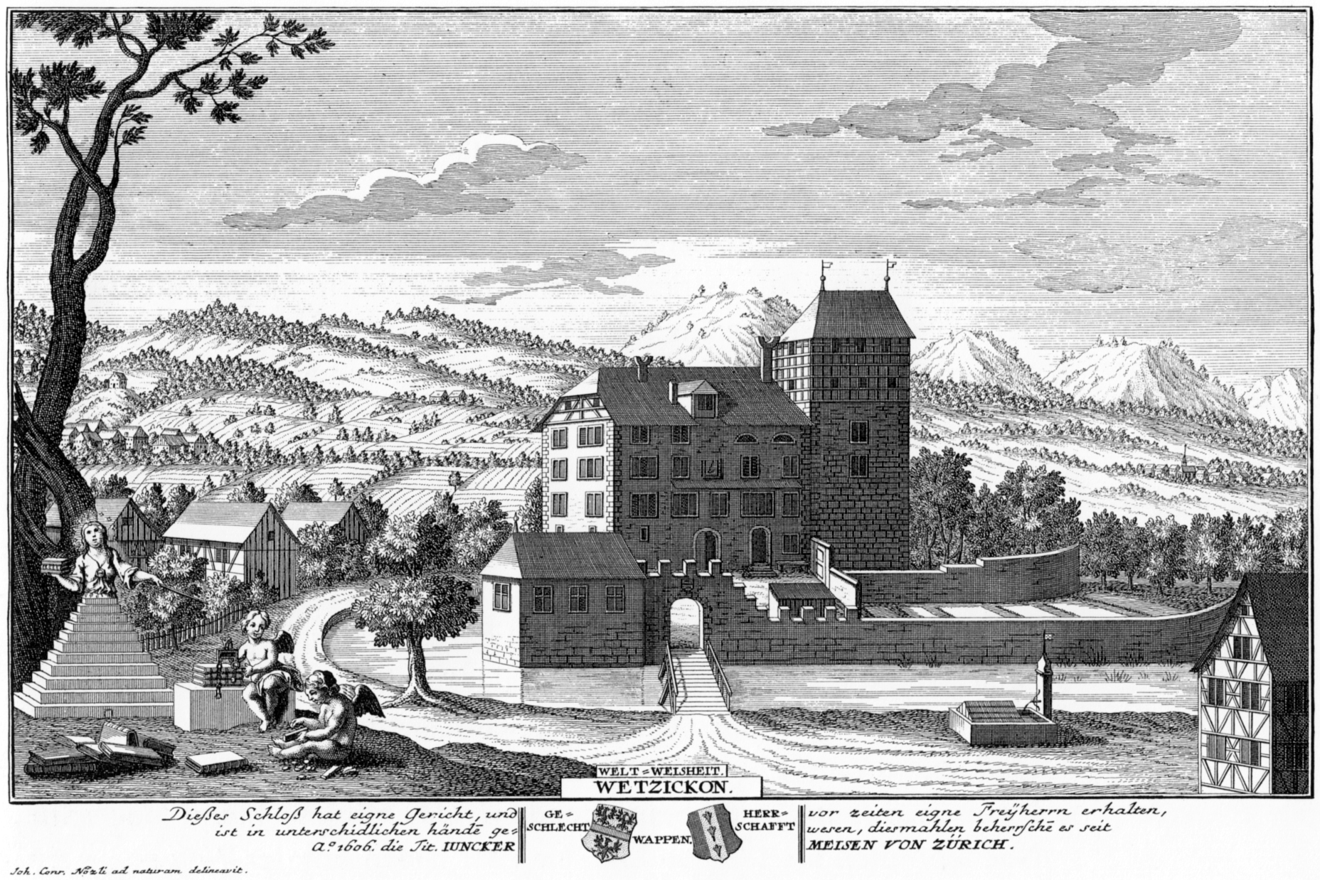 Schloss Wetzikon 1742. Radierung von David Herrliberger nach einer Tuschezeichnung von Hans Conrad Nözli. Erschienen in Herrlibergers Eigentliche Vorstellung der Adelichen Schlösser im Zürich Gebieth, Nr. 15, zweite Lieferung 1743 und Topographie der Eydgnoßschaft, Nr. 50, vierte Lieferung 1755.